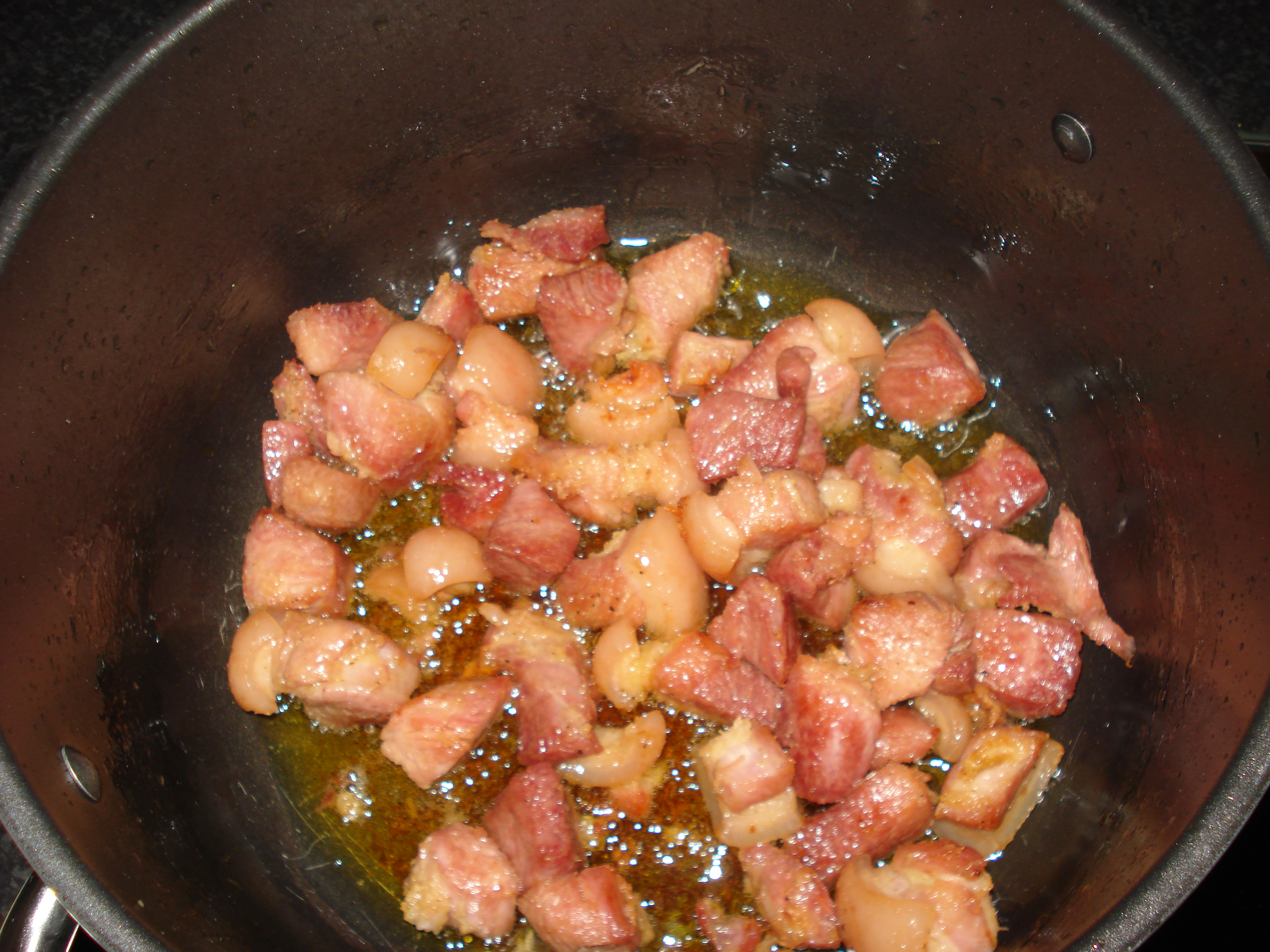 Τηγανιά, βήμα 9ο